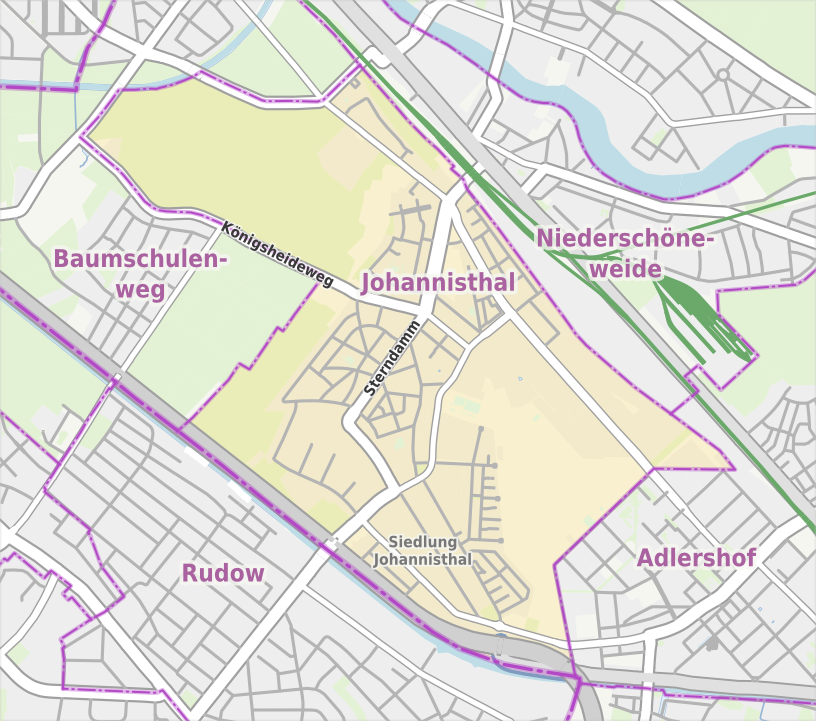 Übersichtskarte der Straßen und Ortslagen in Berlin-Johannisthal